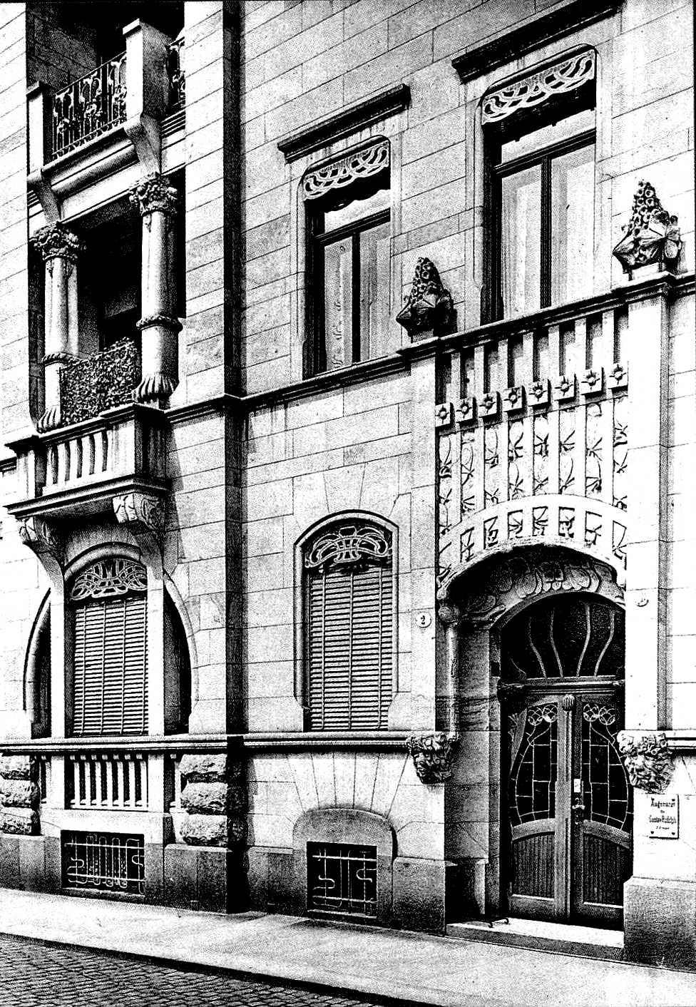 Mehrfamilienwohnhaus Lindengasse 2 in Dresden, Seevorstadt, erbaut durch Felix Reinhold Voretzsch, 1945 zerstört